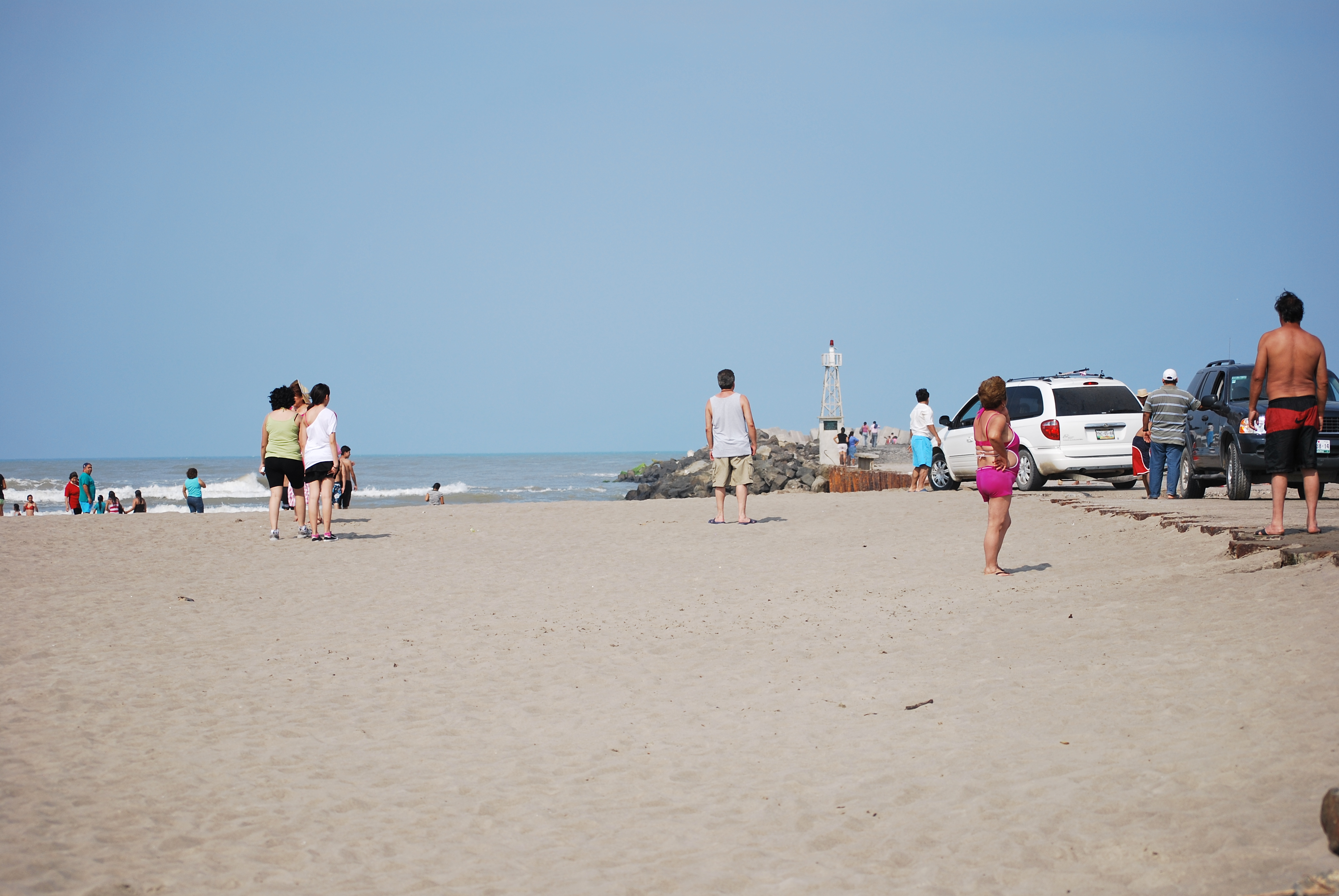 Beach near jetty by river in Tecolutla, Veracruz